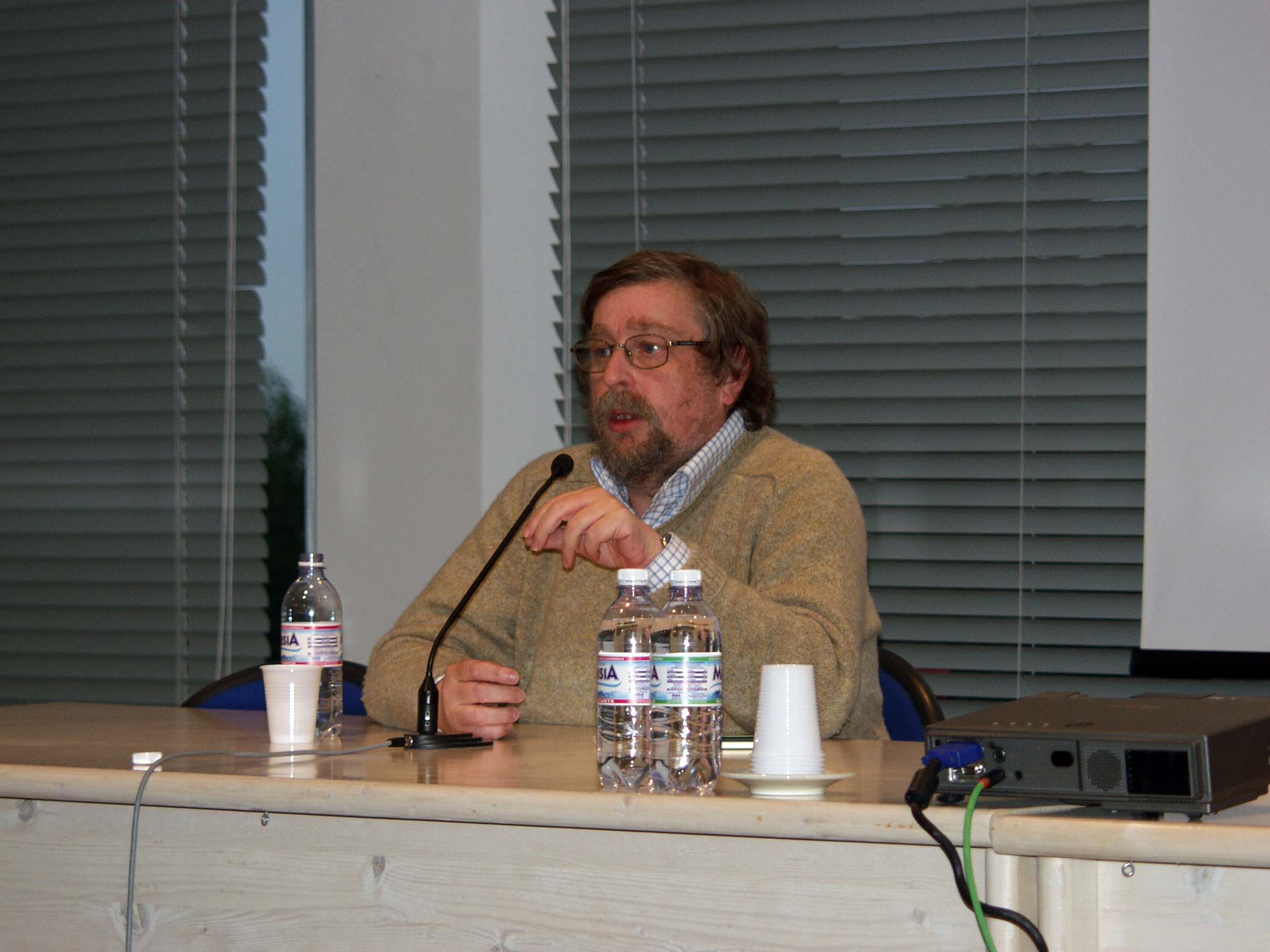 Il noto graphic designer Andrea Rauch presenta la sua mostra di manifesti politici "Il sonno della ragione genera mostri", che comprende una trentina di opere che affrontano temi scottanti in campo politico e sociale, come razzismo, intolleranza, guerra e terrorismo